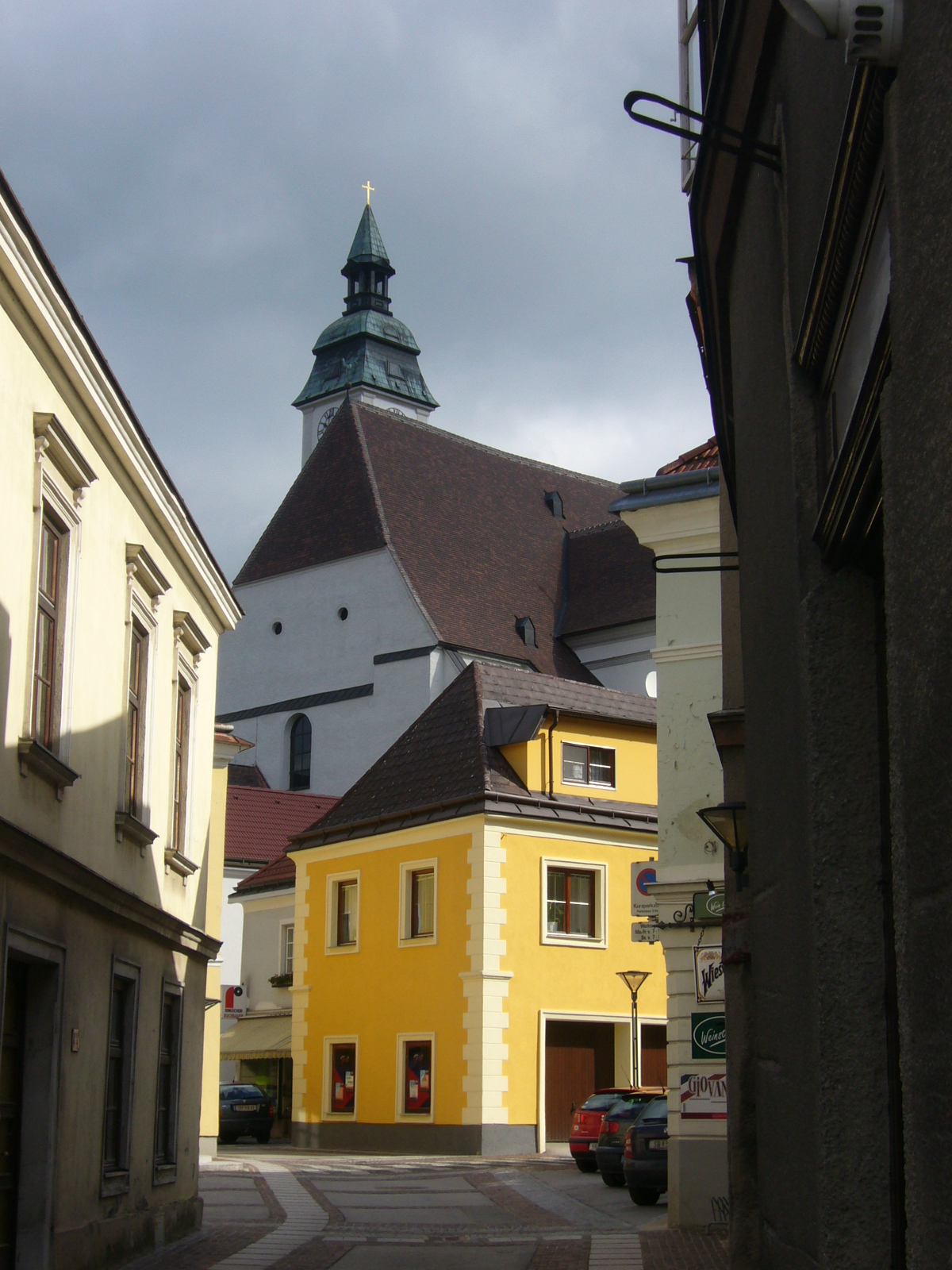 Scheibbs, Innenstadt mit Blick auf die Pfarrkirche